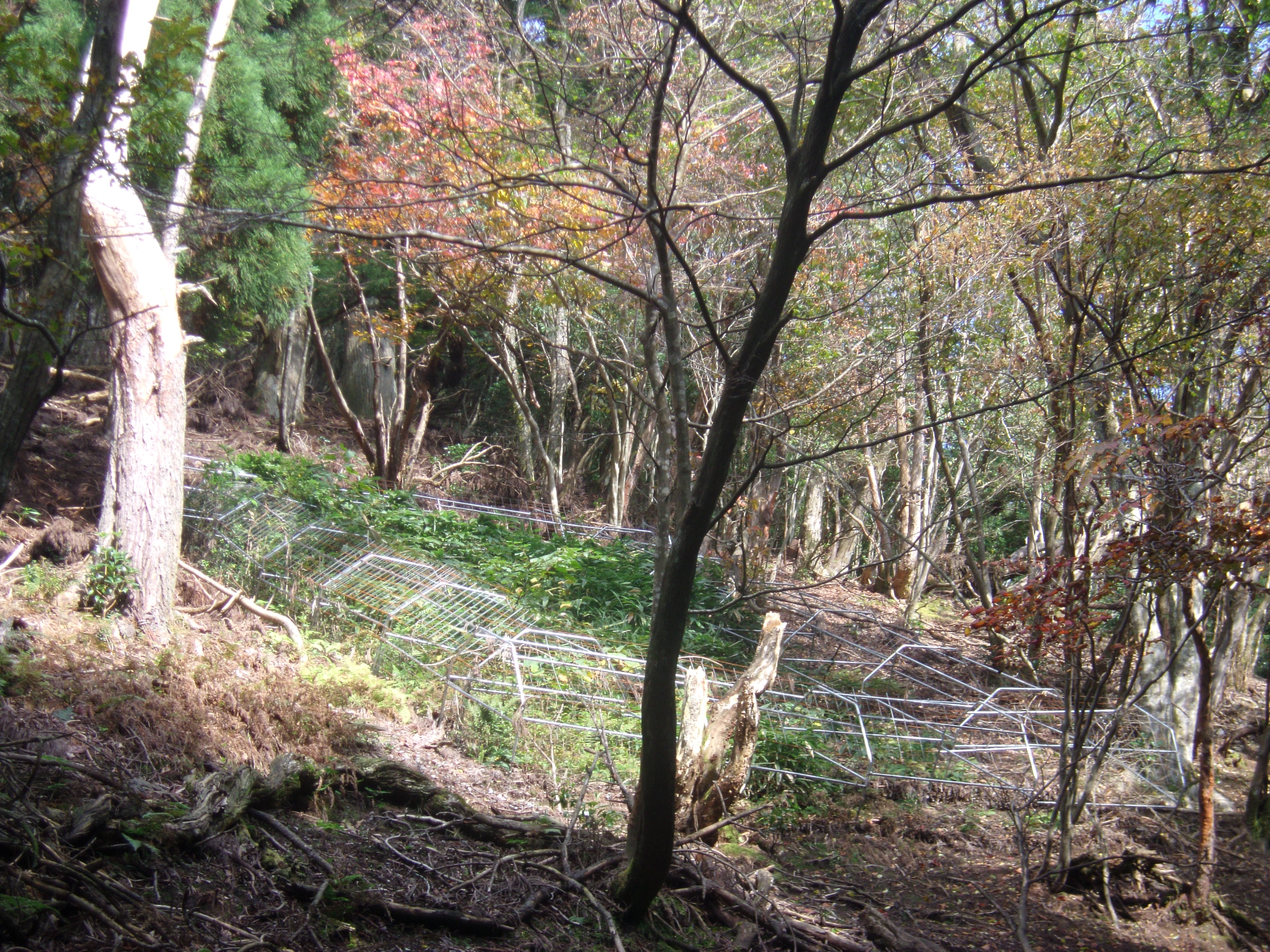 京都市左京区大原百井町の天ケ森近くの野草保護用柵。一帯はシャクナゲ、クリンソウ、マツカゼソウ、ミヤマカタバミ、ミヤコアオイ、ムラサキサギゴケ、ムラサキケマンなどが自生する。